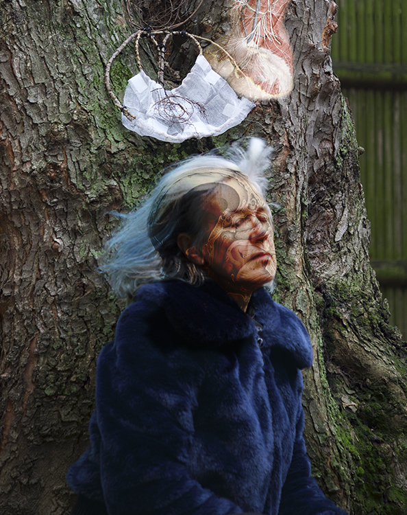 Image de Pascale Weber